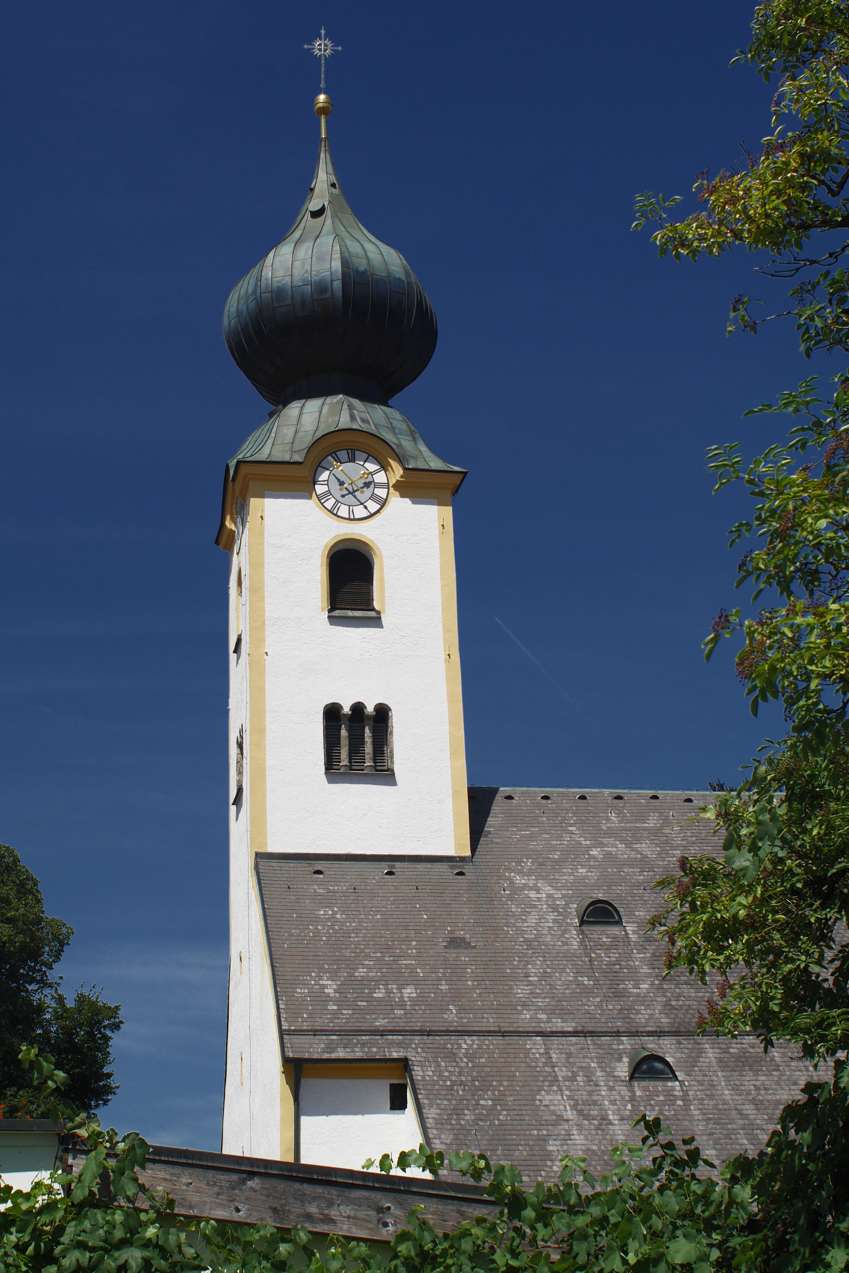 Katholische Pfarrkirche Mariae Himmelfahrt in Grassau im Chiemgau (Bayern)This is a photograph of an architectural monument.